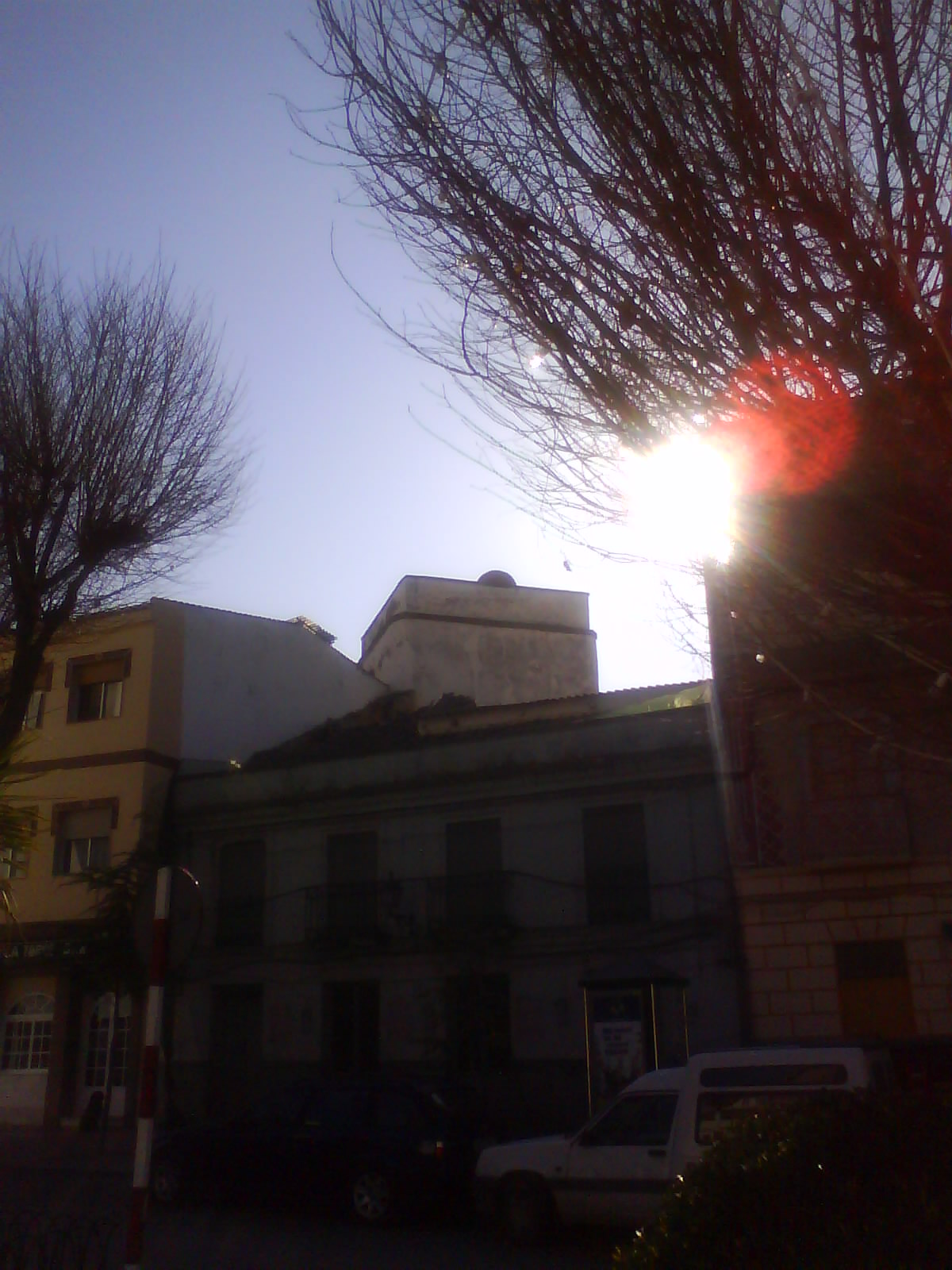 El Torreón de Huétor fue una torre del sistema fortificado amurallado de la alquería de Huétor. Ésta se corresponde con la actual localidad de Huétor-Tájar, ubicada en la margen izquierda del río Genil en el centro del Poniente granadino. El Torreón se localiza en casco antiguo del núcleo urbano, en la zona sur de la localidad, muy próxima a la Plaza de Andalucía, donde también su ubican la Iglesia Parroquial de Santa Isabel y el Edificio Consistorial. Se encuentra inscrito en el Registro General de BIC desde el 22 de junio de 1993.